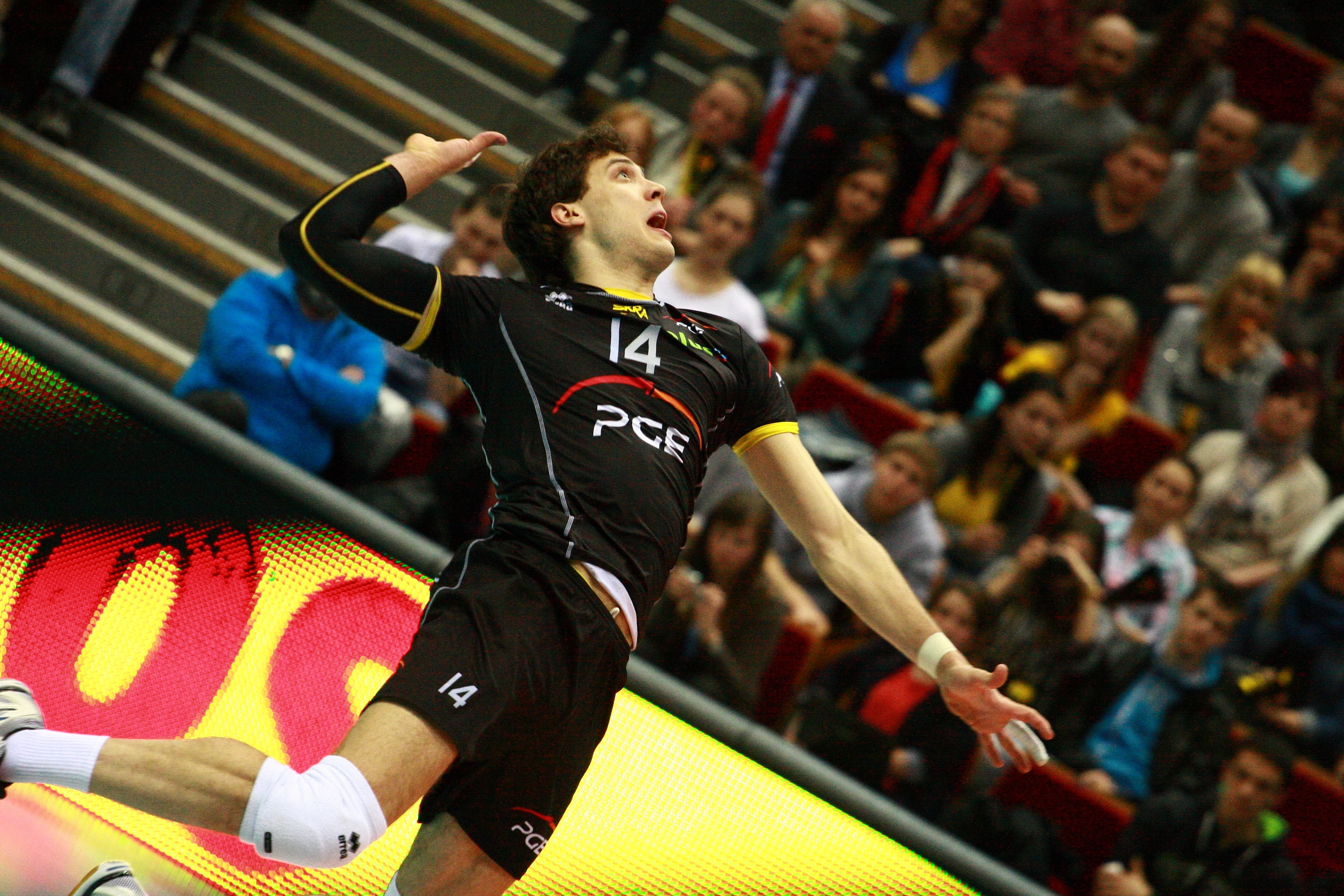 Lotos Trefl Gdańsk vs Skra Bełchatów